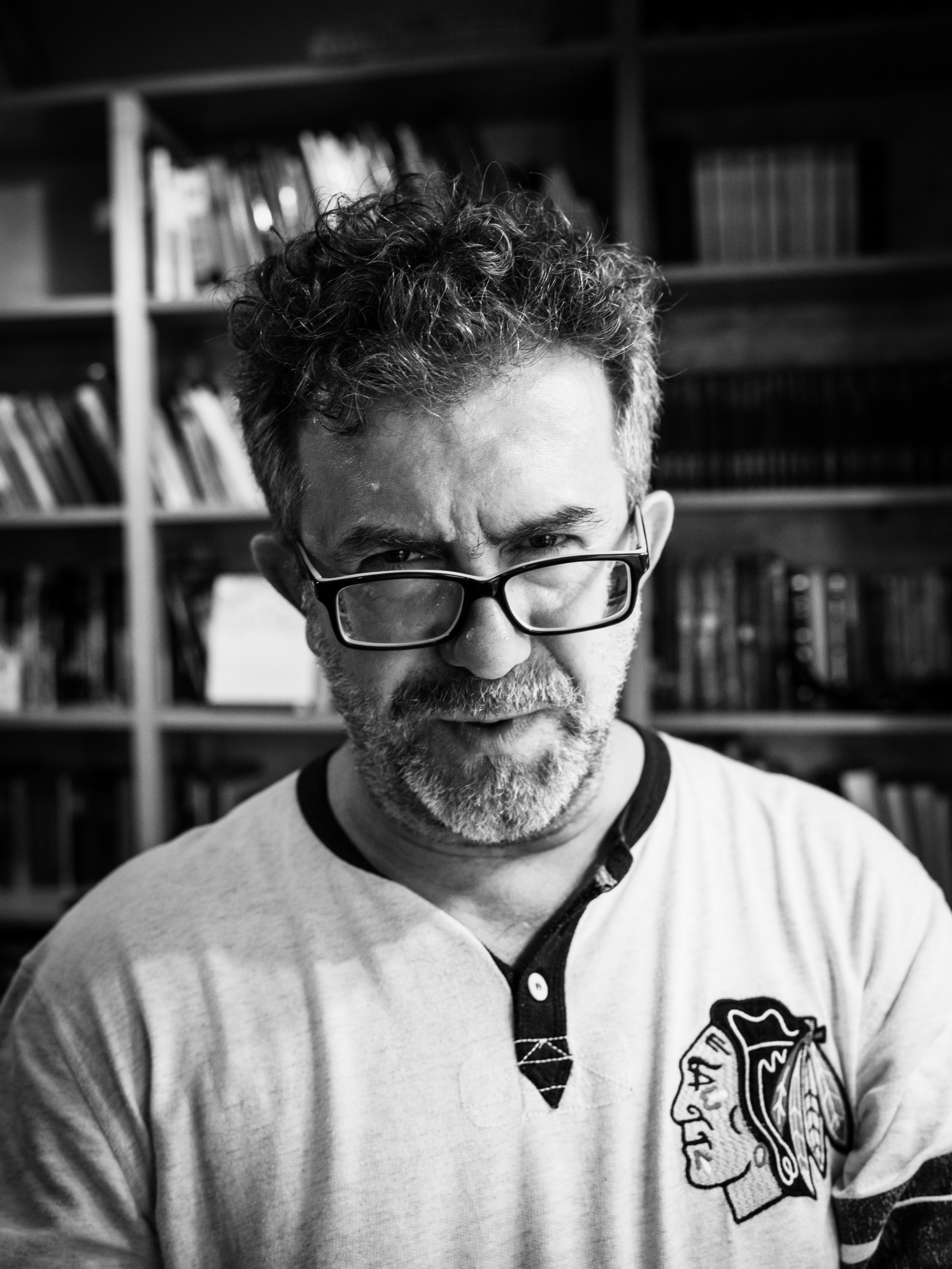 Арсен Ревазов